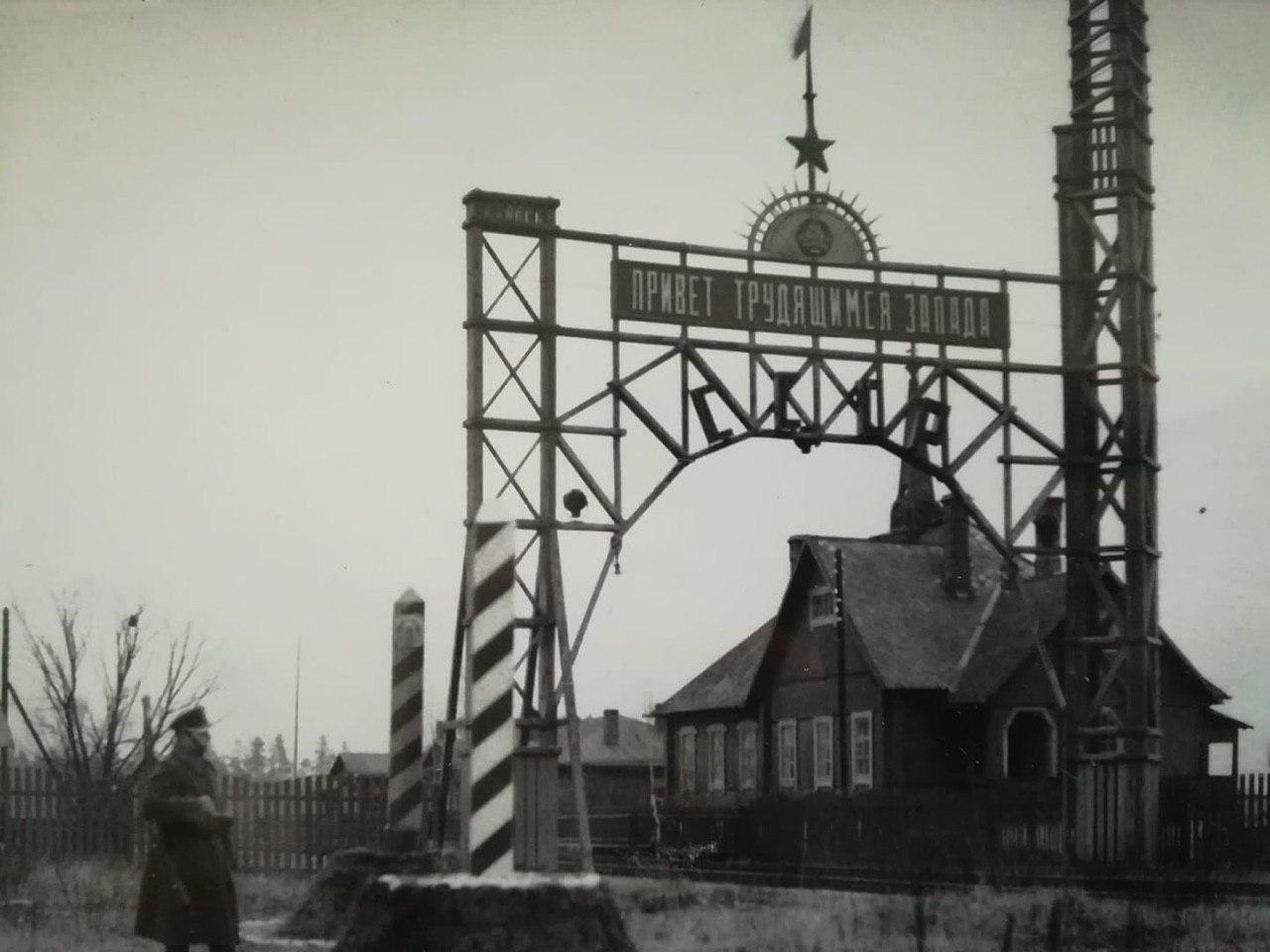 Беларуская (тарашкевіца): Негарэлае (Nieharełaje), Коласава (Kołasava). Брама